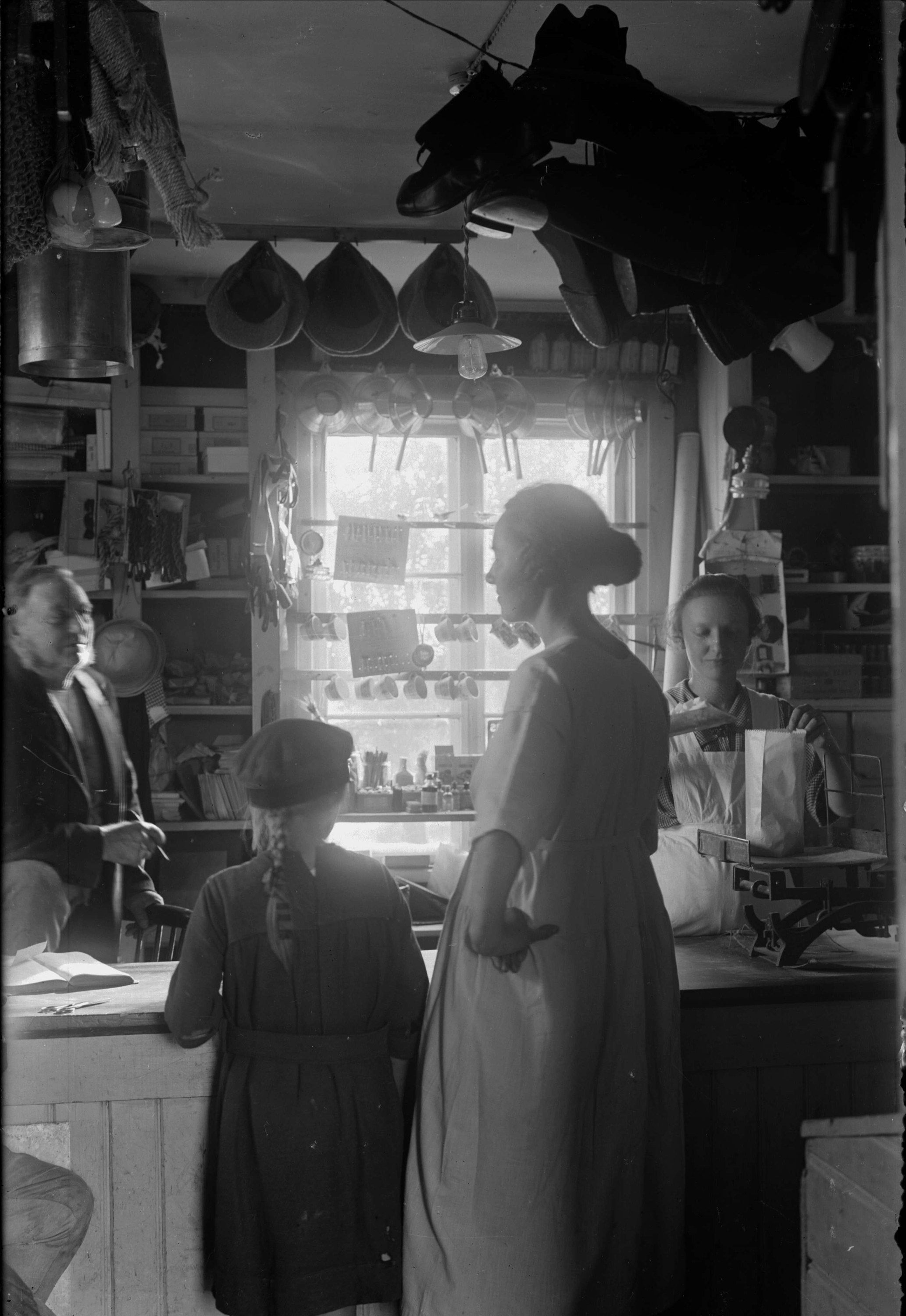 Depicted place: Ångermanland, Fjällsjö, Jansjö (Sverige (SE))